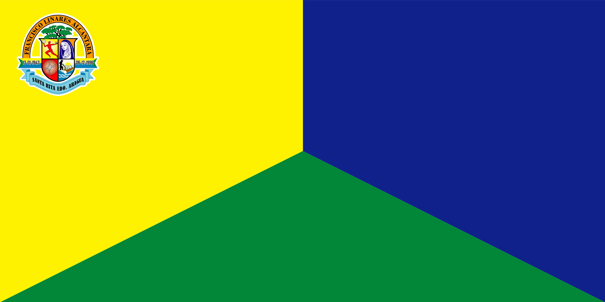 Fue creada por José Luis Jardín el 04 de Abril del año de 2001 Los colores son: Amarillo, Azul y Verde AMARILLO: Significa el gentilicio y la fe cristiana de nuestro pueblo con ella devoción a nuestra Señora Santa Rita de Cassia. AZUL: Representa la hidrografía que está enmarcada por la fisiográfica de depresión del lago de Valencia y el cielo de nuestro pueblo. VERDE: Representa la vegetación y la fertilidad de nuestros suelo así como también la agricultura con los cultivos de caña de azúcar bananos y yuca.